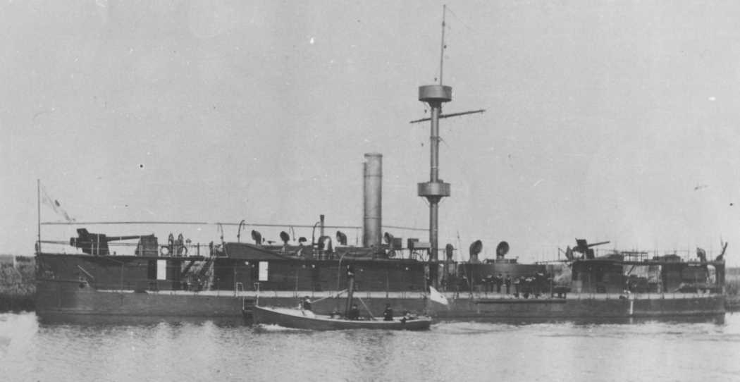 Monitor Los Andes. Flota de la Armada Argentina. 1874-1930